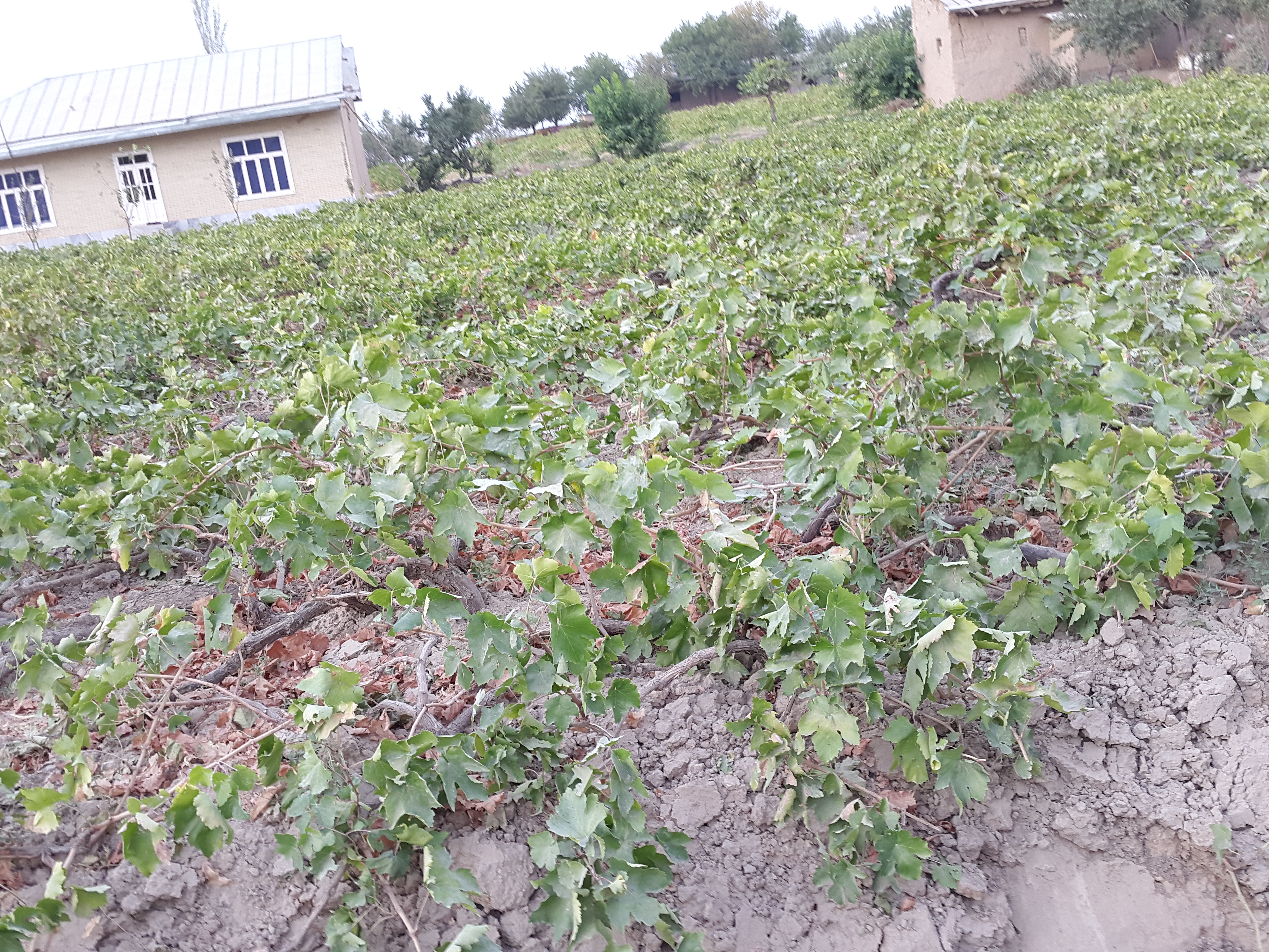 Виноградники без шпалер, распространены в Ургутском районе Самаркандской области Узбекистана. Oʻzbekcha/ўзбекча: Simdan holda uzumzorlar, O'zbekiston, Samarqand viloyati Urgut tumanida umumiy.